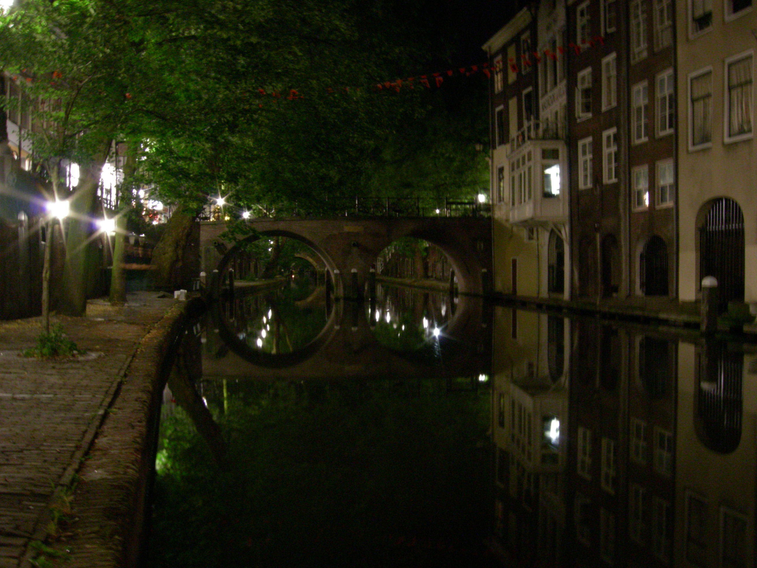 Canali di Utrecht